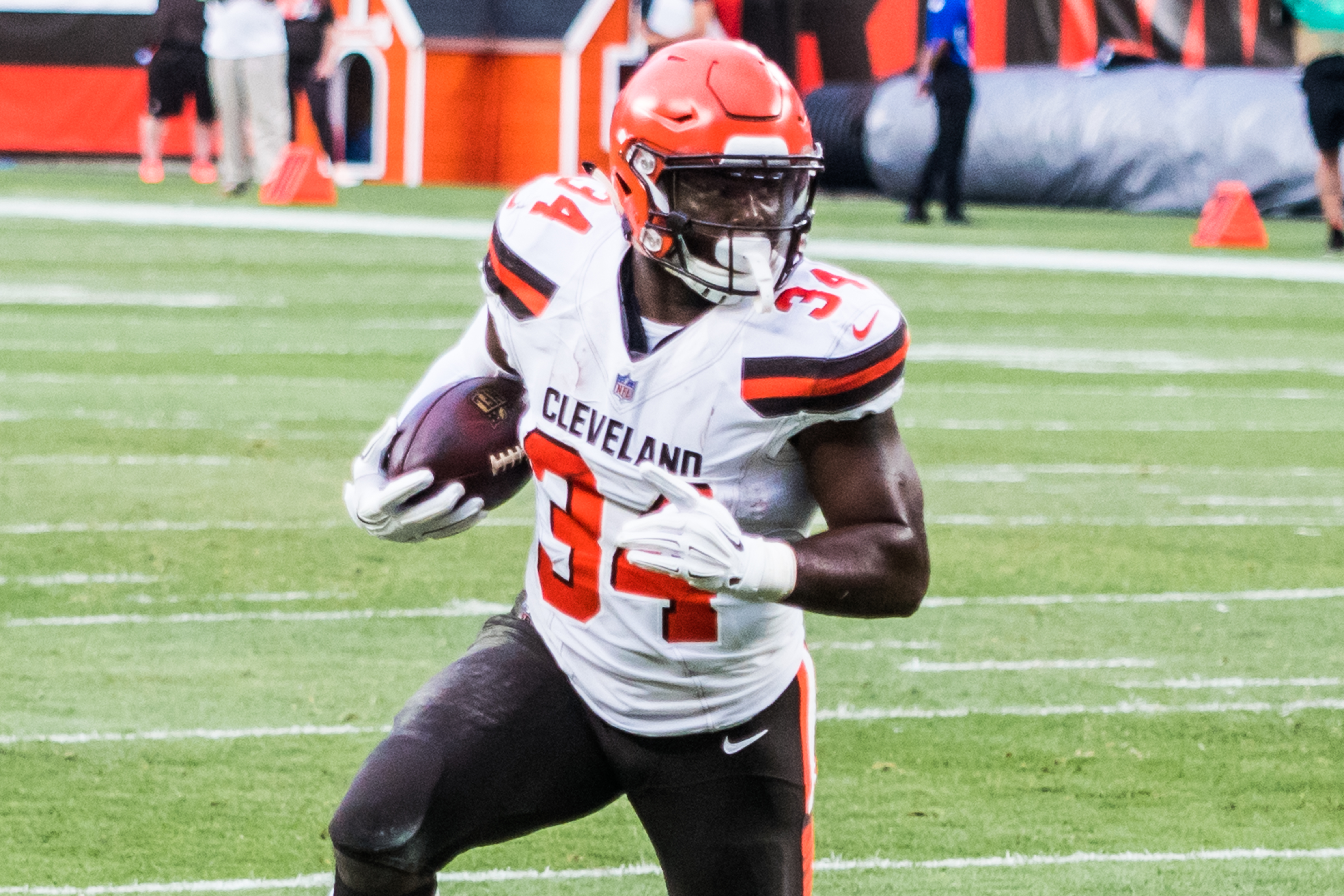 Carlos Hyde